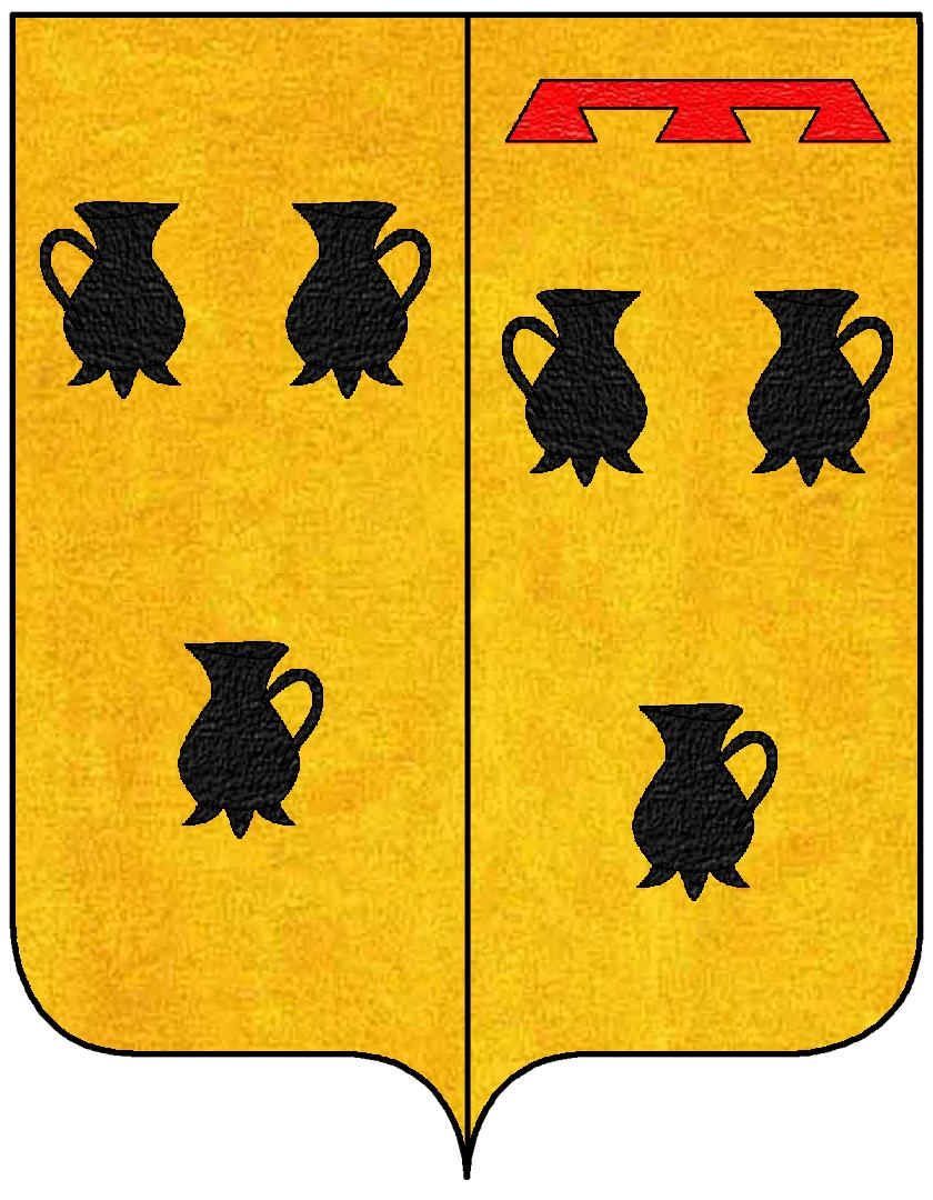 Stemma della famiglia Pignatelli di Strongoli